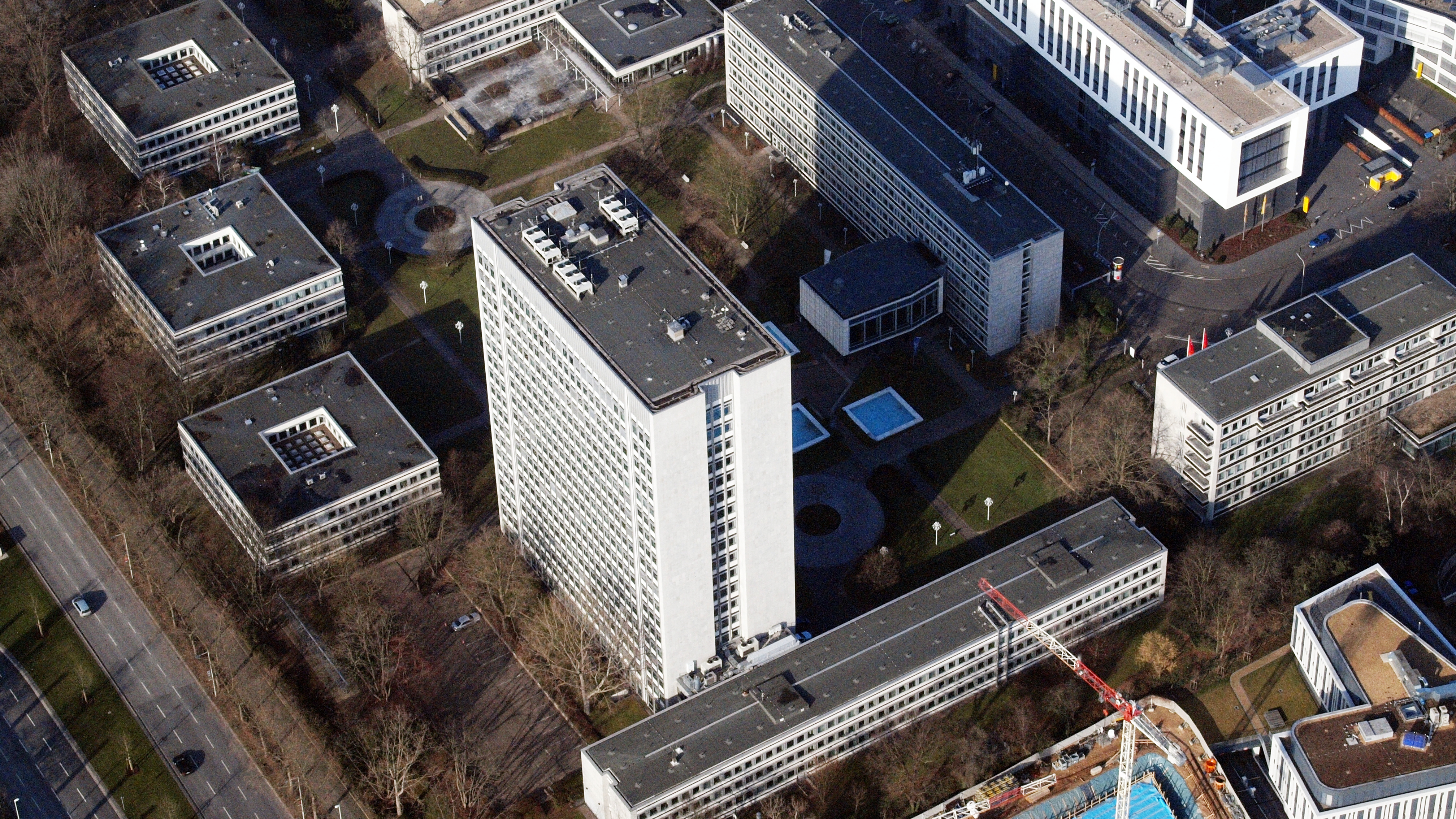 Bürobauten am Tulpenfeld, Bonn-Gronau: Luftaufnahme; links unten die Helmut-Kohl-Allee